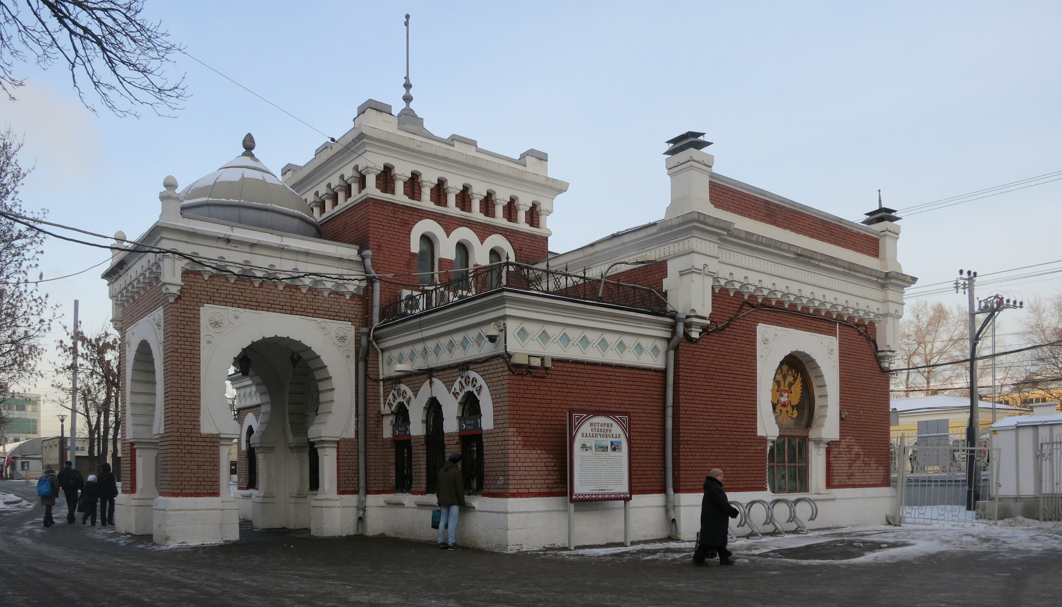 Здание Царского павильона Николаевской железной дороги. Здание связано с революционными событиями 1917 г.; Царский павильон на платформе Каланчевская г.Москвы: Каланчёвская ул., дом 12, Красносельский, Центральный округ, Москва